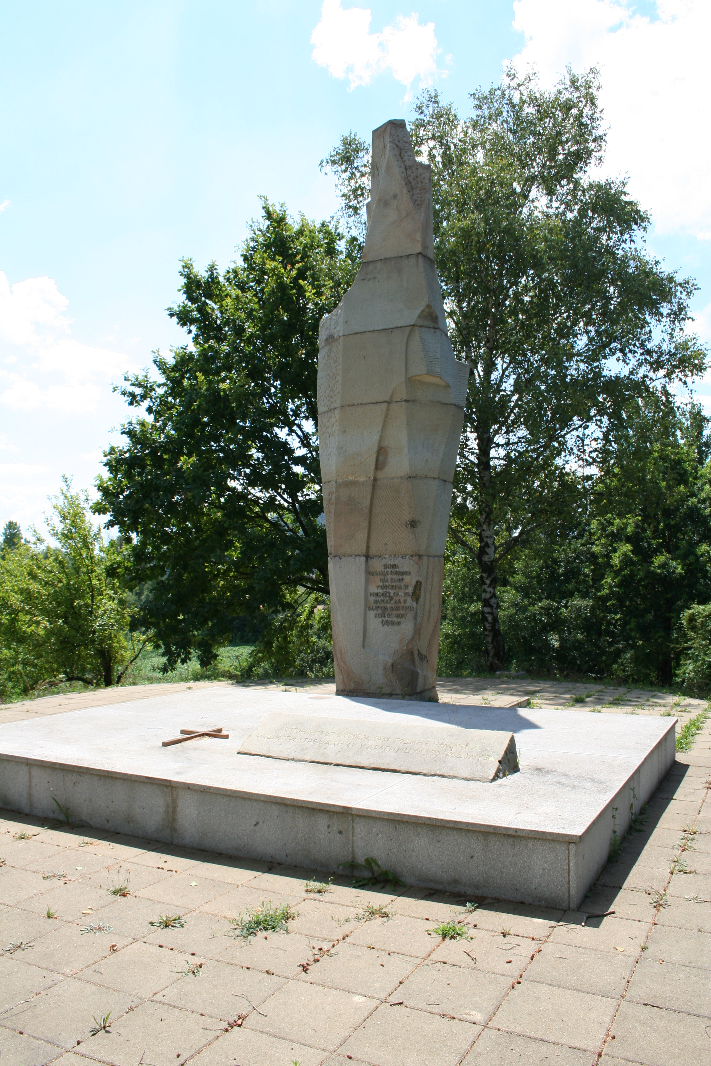 Spomenik i kosturnica, Draginac